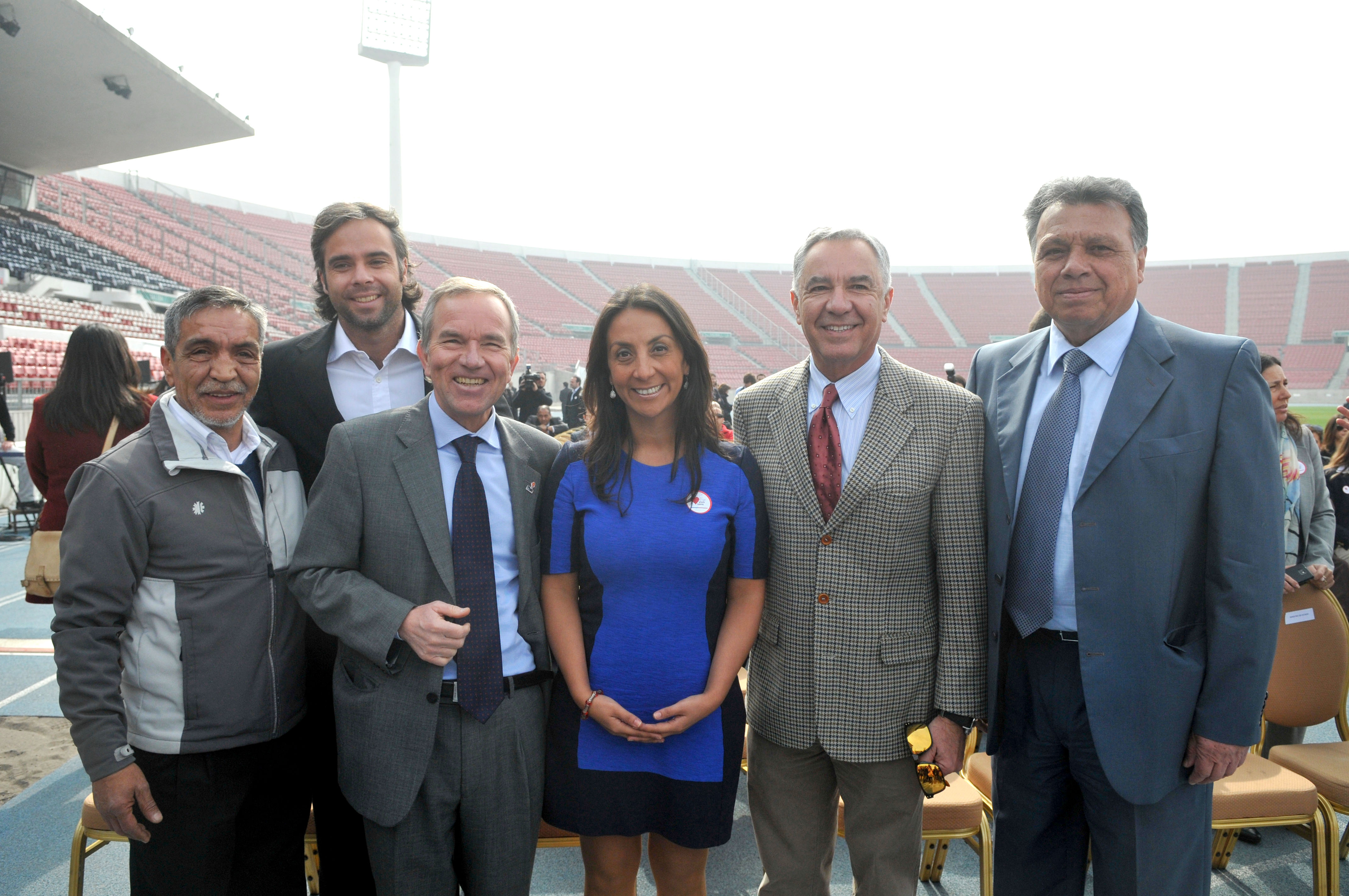 Promulgación de la ley de Ministerio del Deporte. De izquierda a derecha: Martin Vargas, Fernando Gonzalez, Gabriel Ruiz Tagle, Cecilia Perez, Eliseo Salazar y Elias Figueroa.